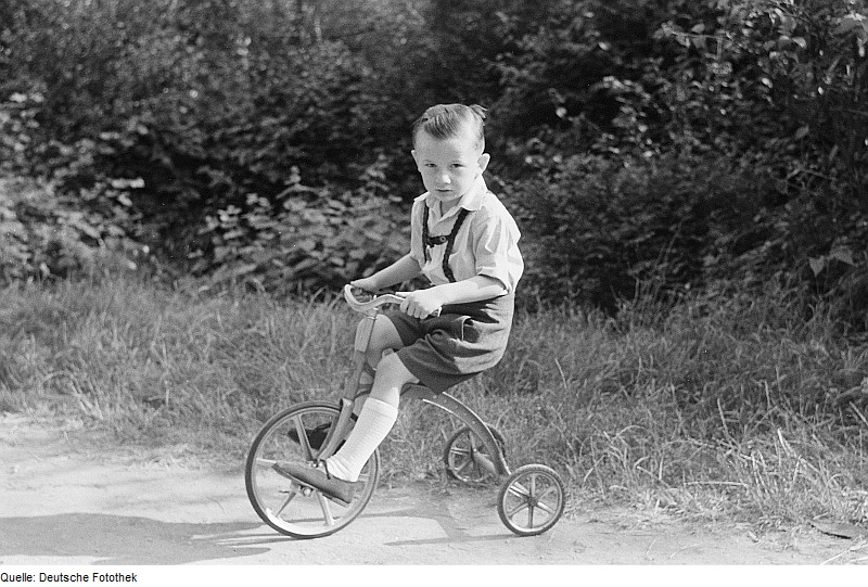 Original image description from the Deutsche FotothekEin Junge auf einem Dreirad